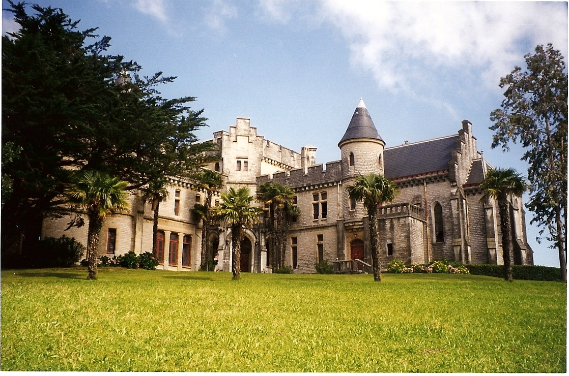 Château d'Abbadia près d'Hendaye (64)